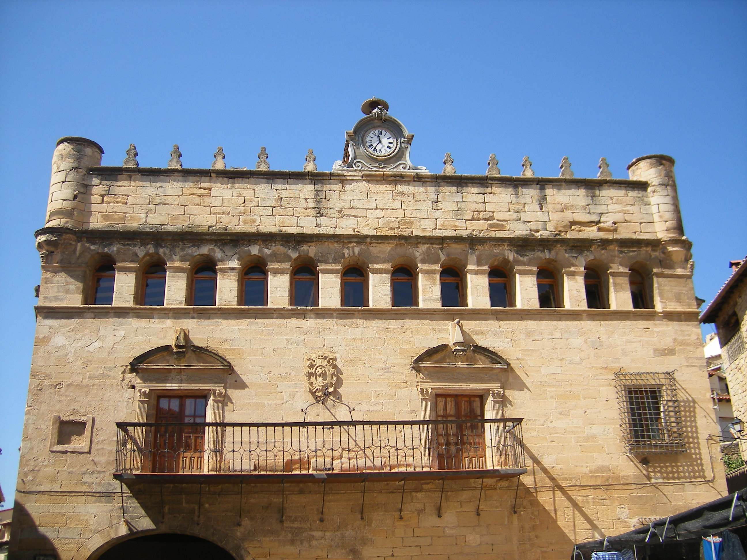 Aragonés: Conzello de La Fraxneda (Aragón).